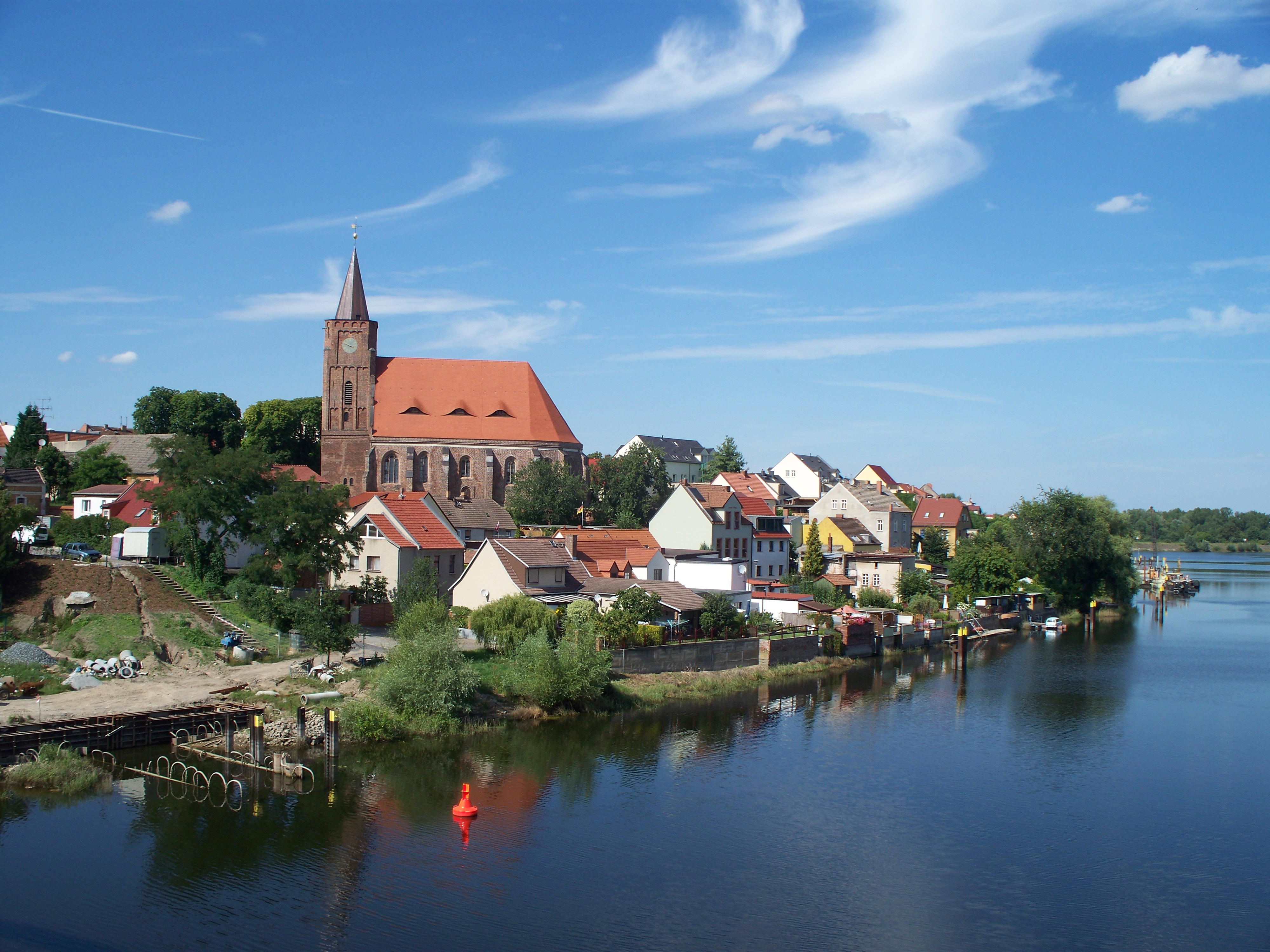 Panorama von Fürstenberg, Oder-Spree-Kanal im Vordergrund